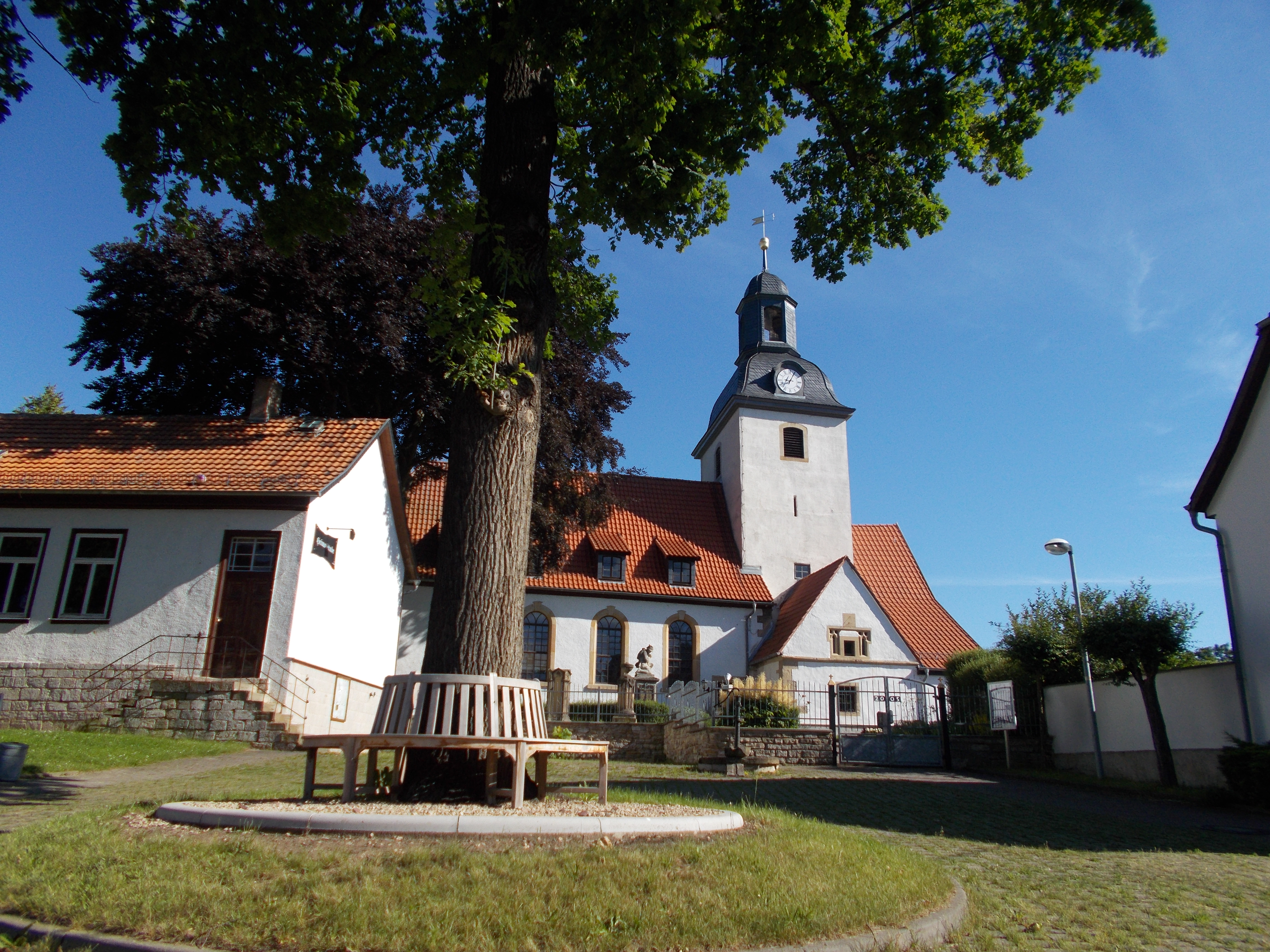 Dieses Bild zeigt den Dorfplatz vor der St. Nikolauskirche in Hochheim (Thür.)